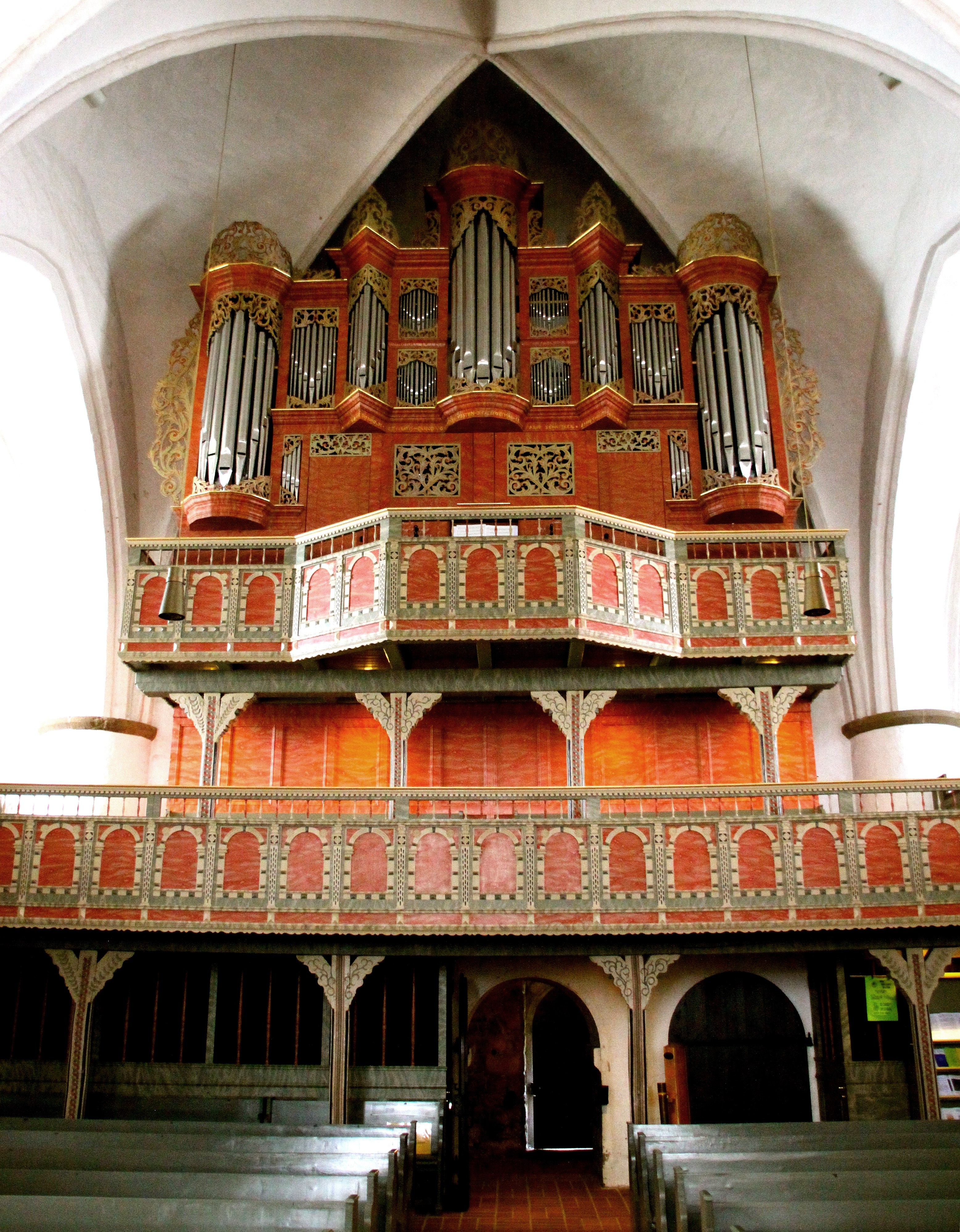 Die Orgel der Kirche St.-Cyprian-und-Cornelius in Ganderkesee